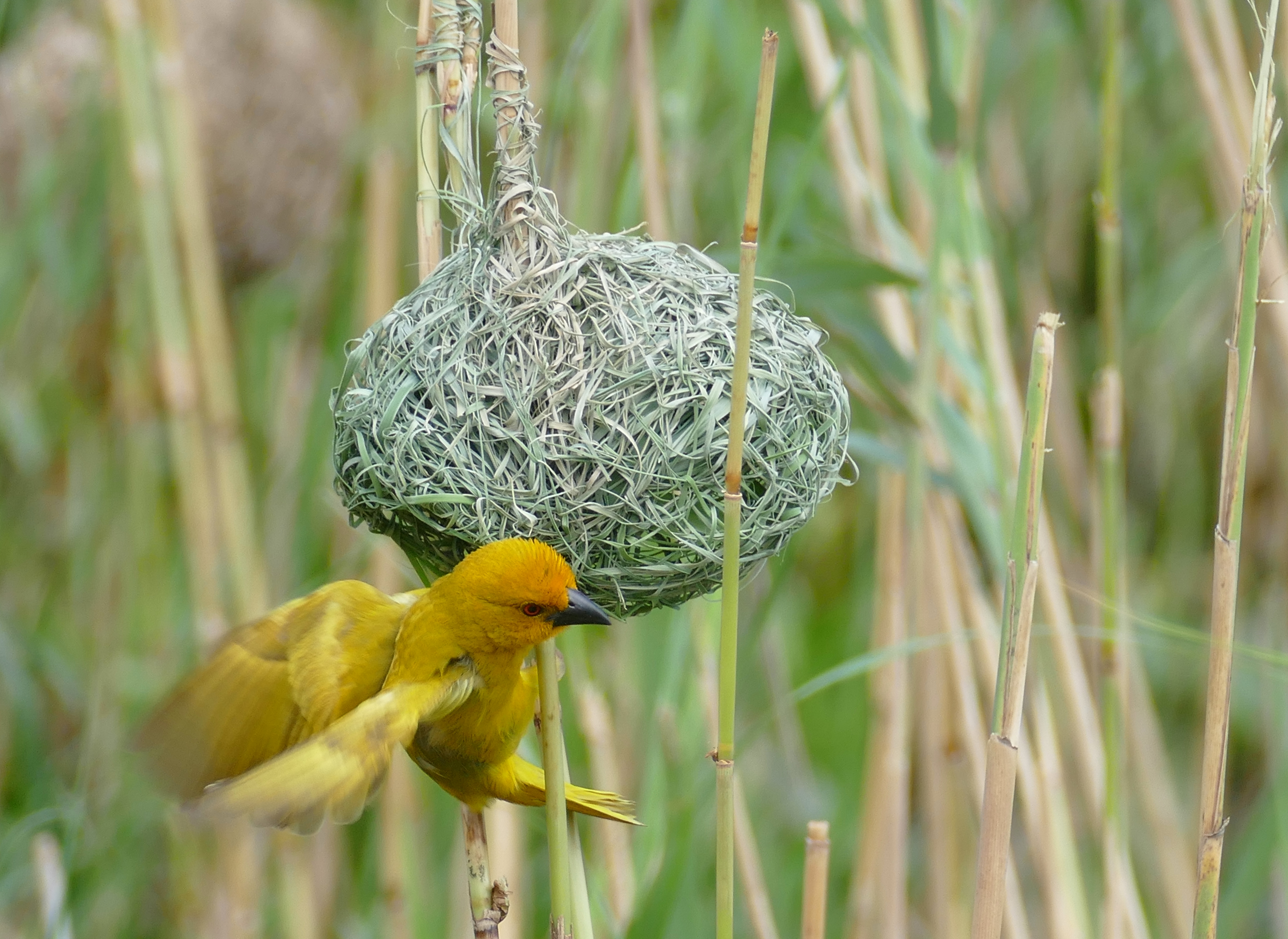 Hippo Cruise, St Lucia, KwaZulu-Natal, SOUTH AFRICA